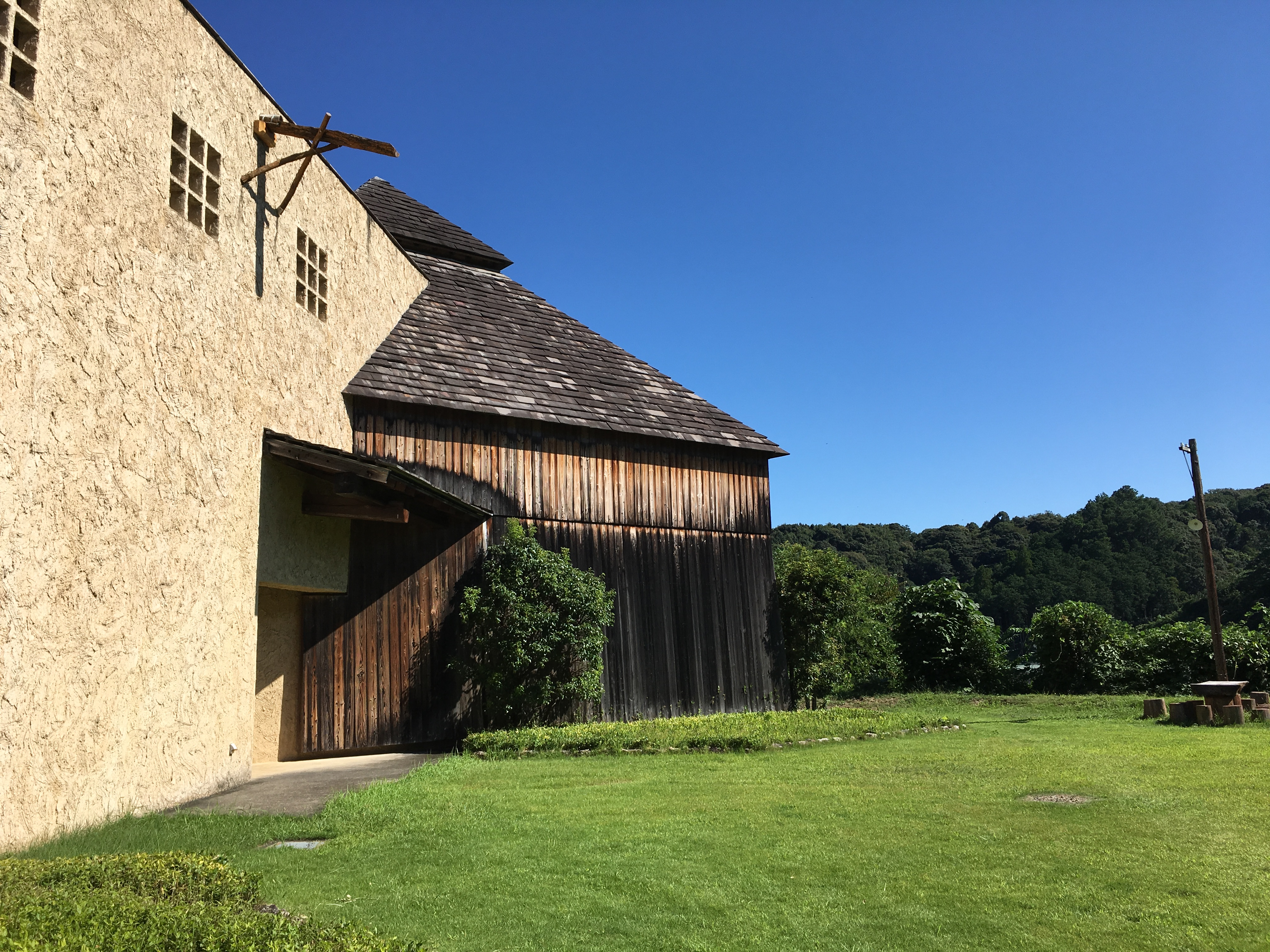 浜松市秋野不矩美術館（静岡県浜松市）外観